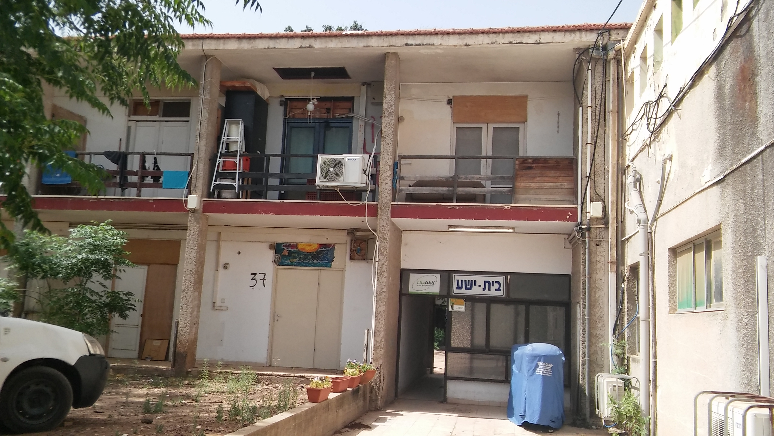 בית ישע גבעת ברנר